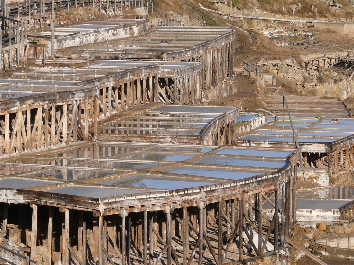 Plataformas de evaporación del Valle Salado de Salinas de Añana, Páis Vasco, España